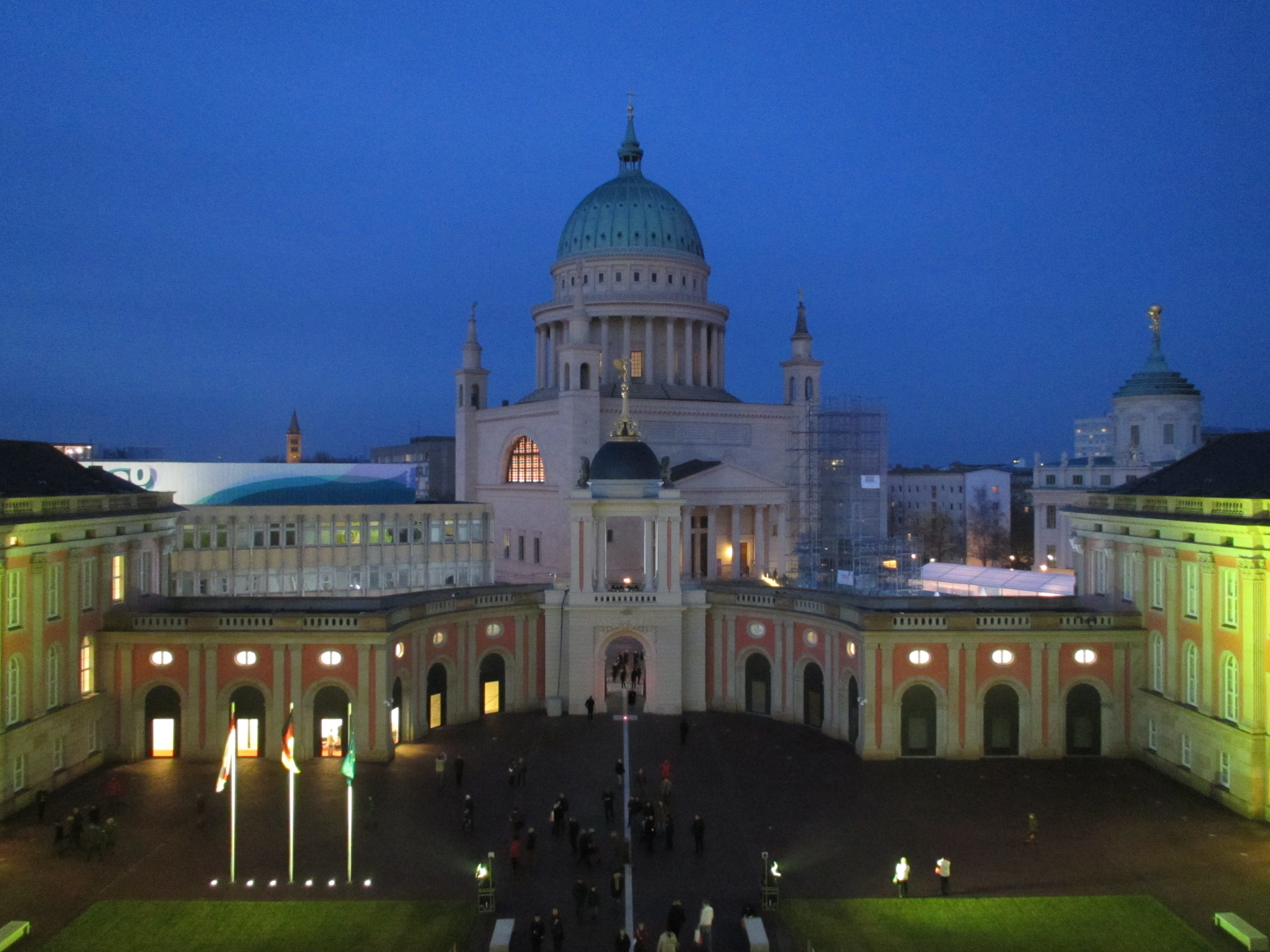 Innenhof des Brandenburger Landtages, Blick auf das Fortunaportal und die Nikolaikirche